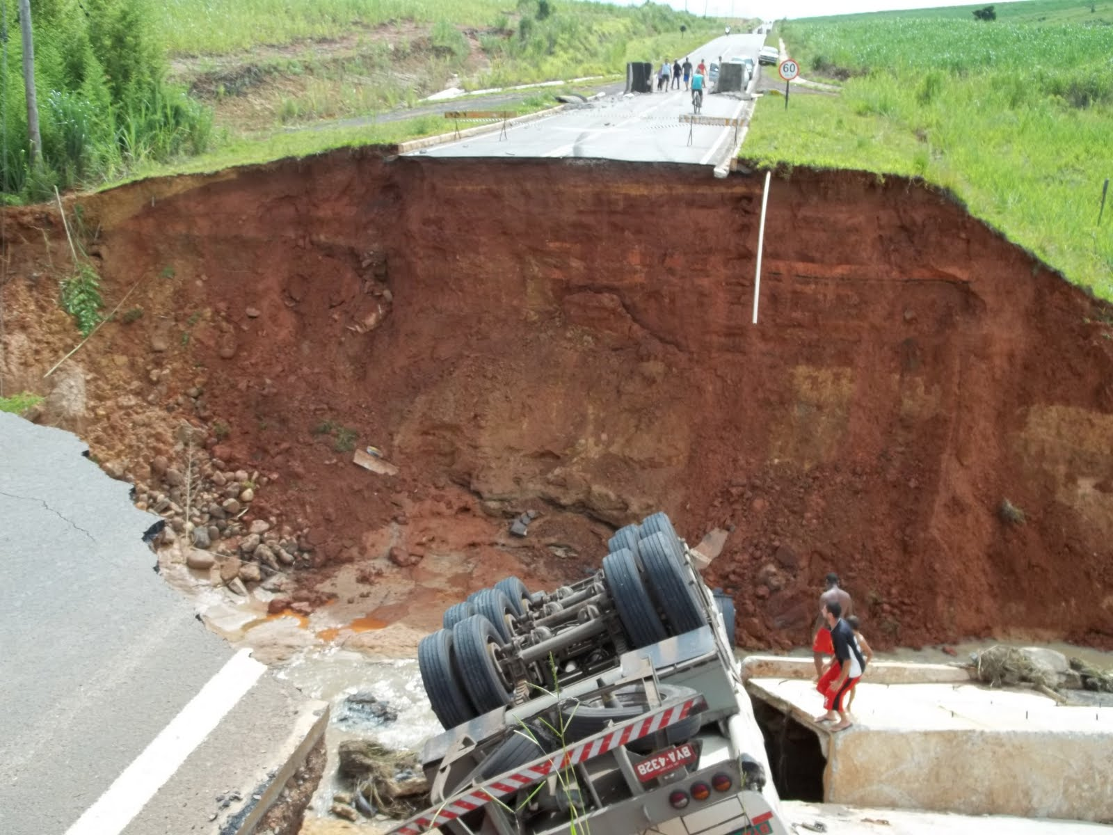 Cratera surgida após fortes chuvas na região da Rodovia Americana-Paulínia